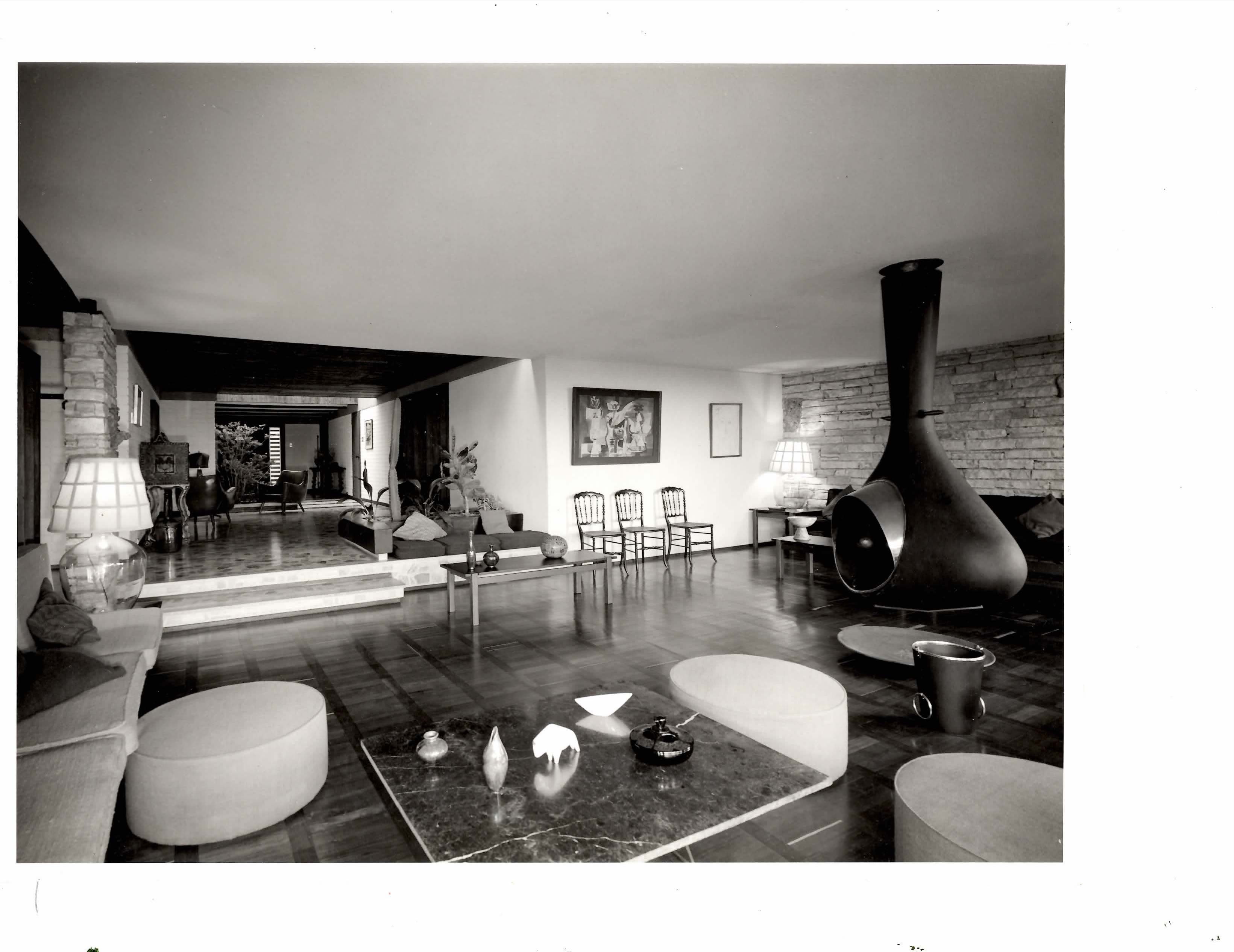 Vista interior casa familiar, diseño y construcción de H Vargas Rubiano (1960)